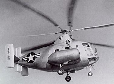 Kellett XR-10 helicopter prototype